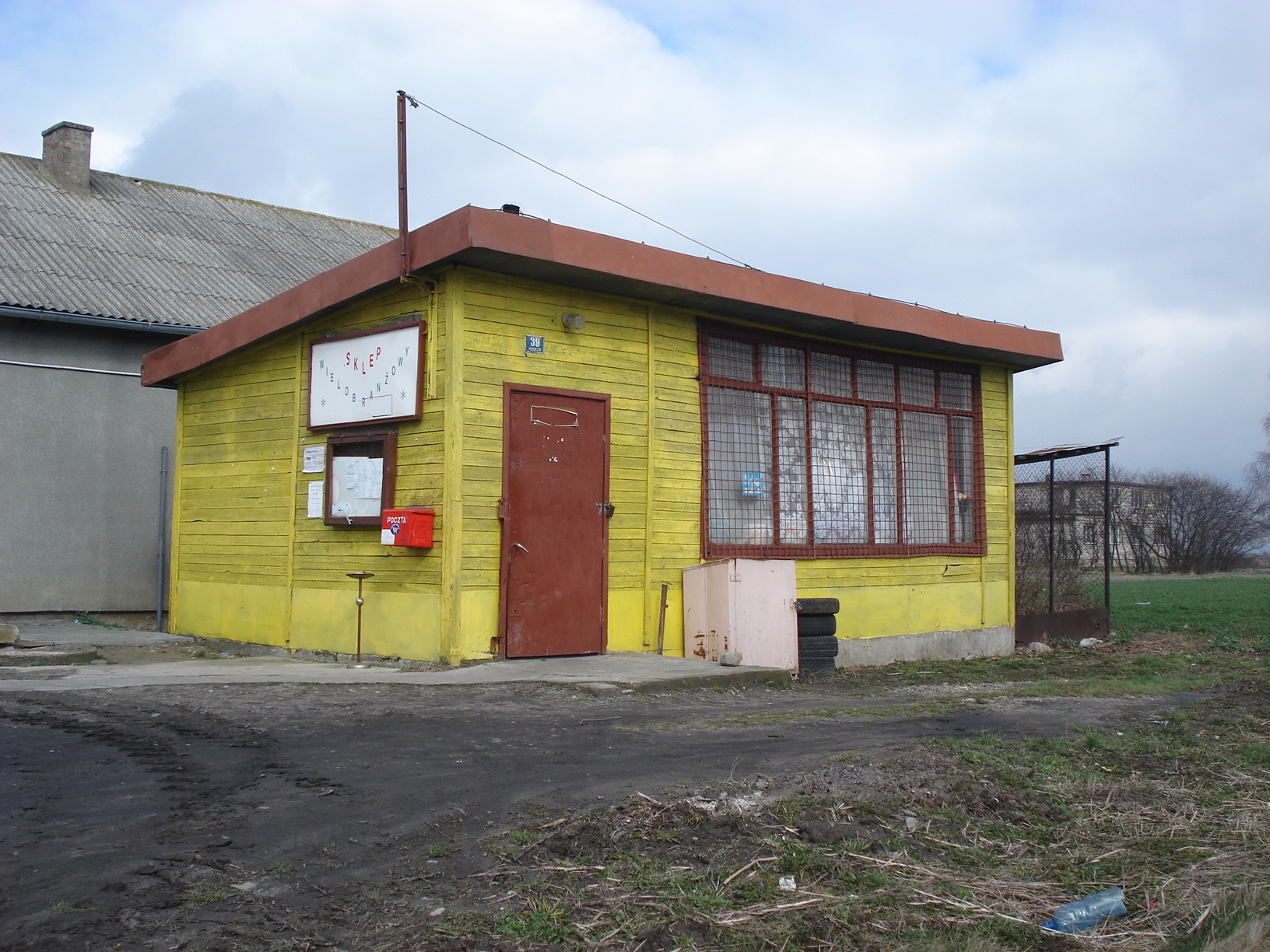 sklep.